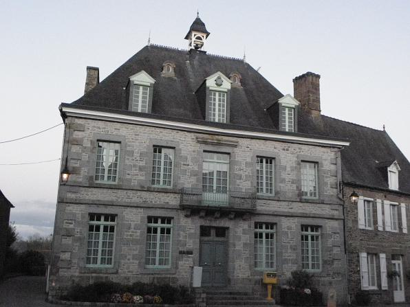 Mairie d'Antrain (35)